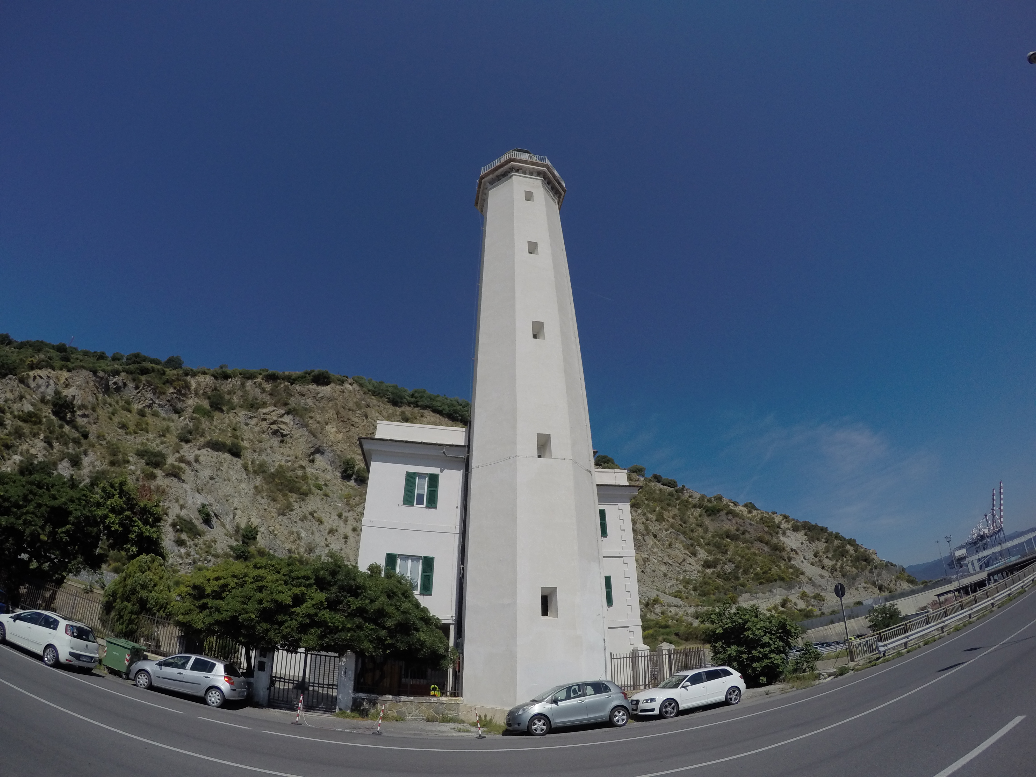 Bergeggi - SS1 - Il Faro - Via Aurelia